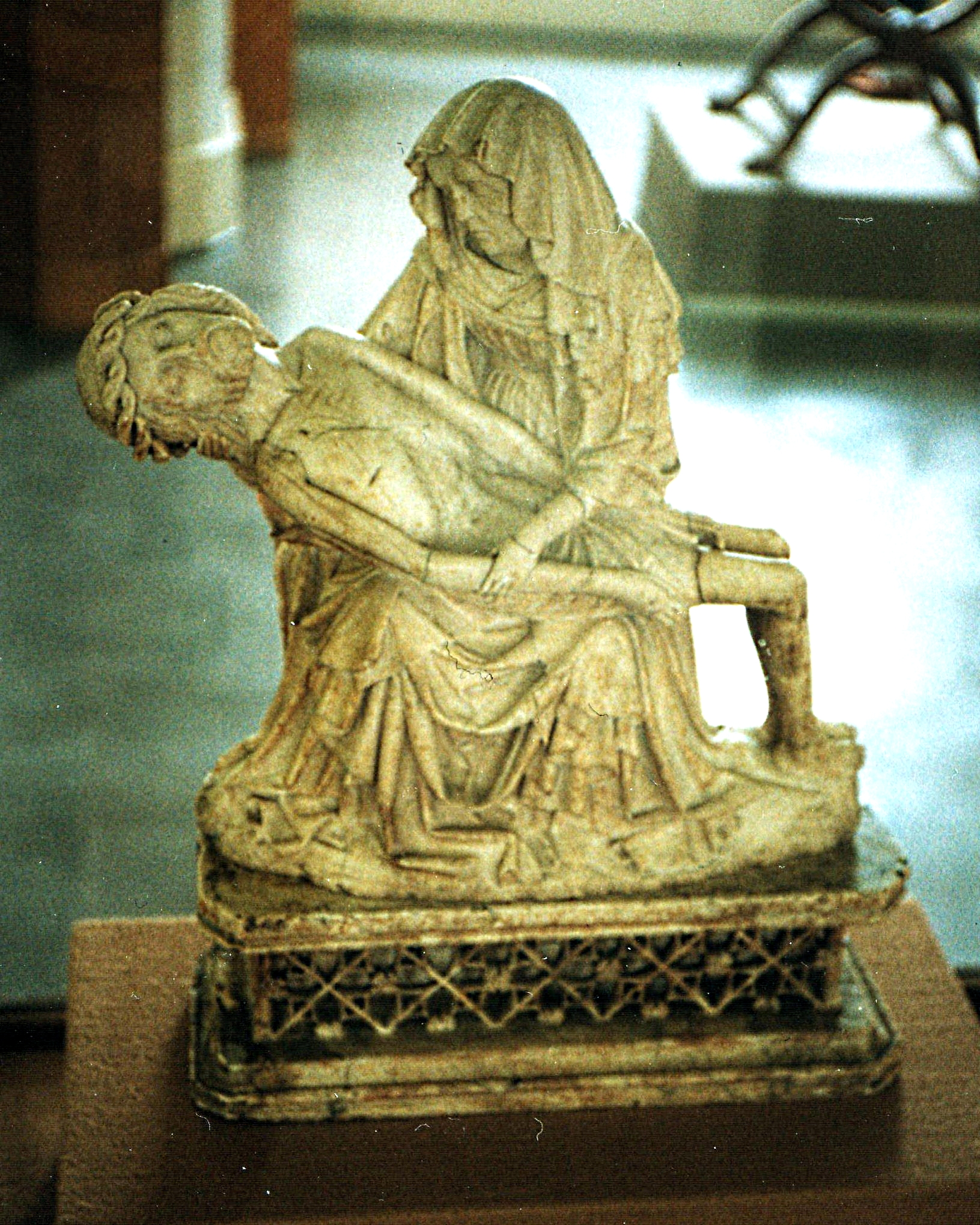 Lorcher Pieta, Vesperbild aus Alabaster ehemals aus Lorch (Rheingau), heute im Hessischen Landesmuseum in Wiesbaden, Sammlung Nassauischer Altertümer